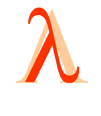 Greek letter